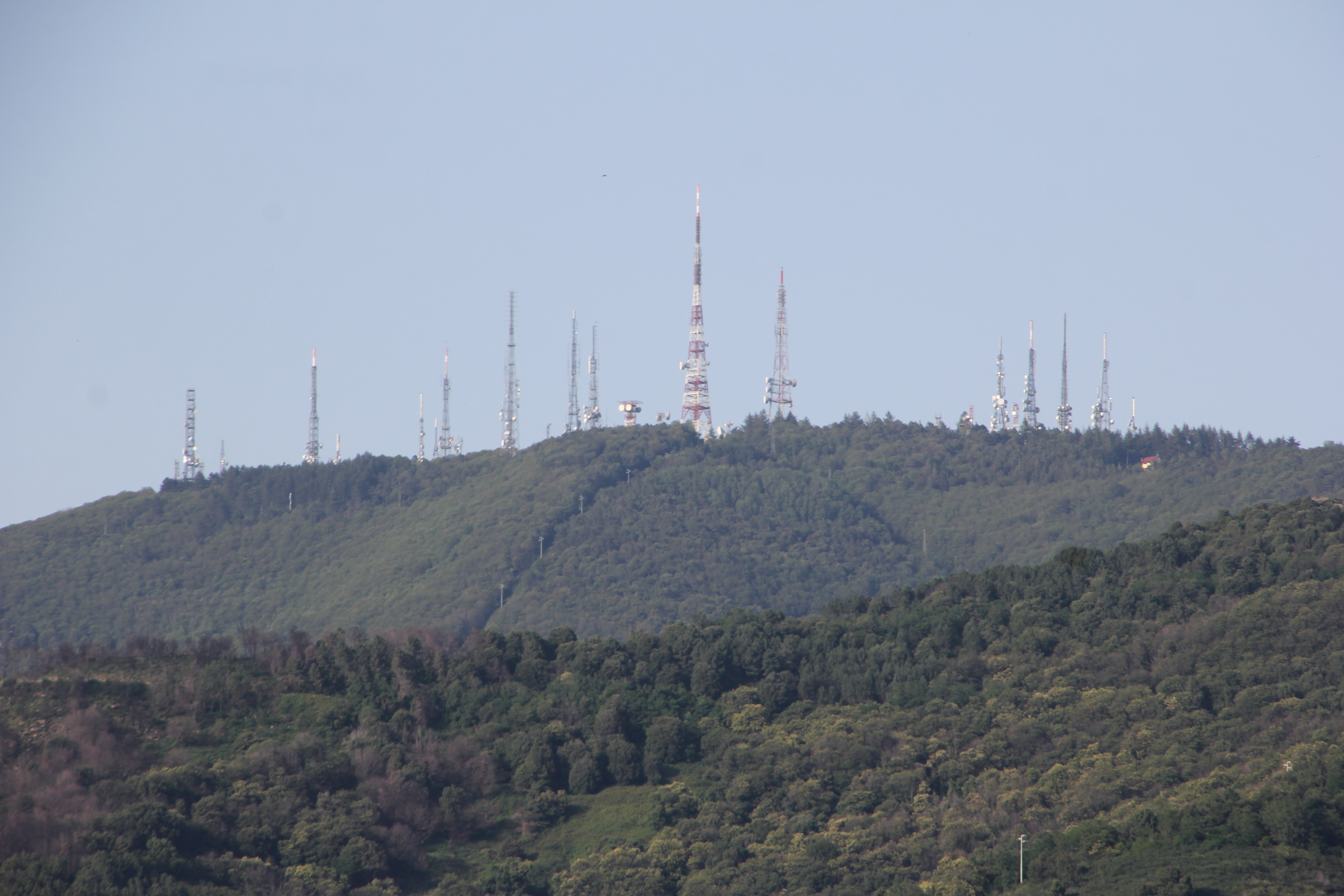 Monte Serra: le antenne dei ripetitori televisivi